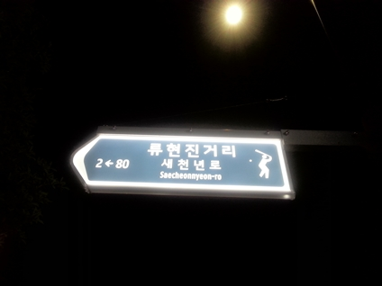 류현진거리 표지판. 인천광역시 동구.